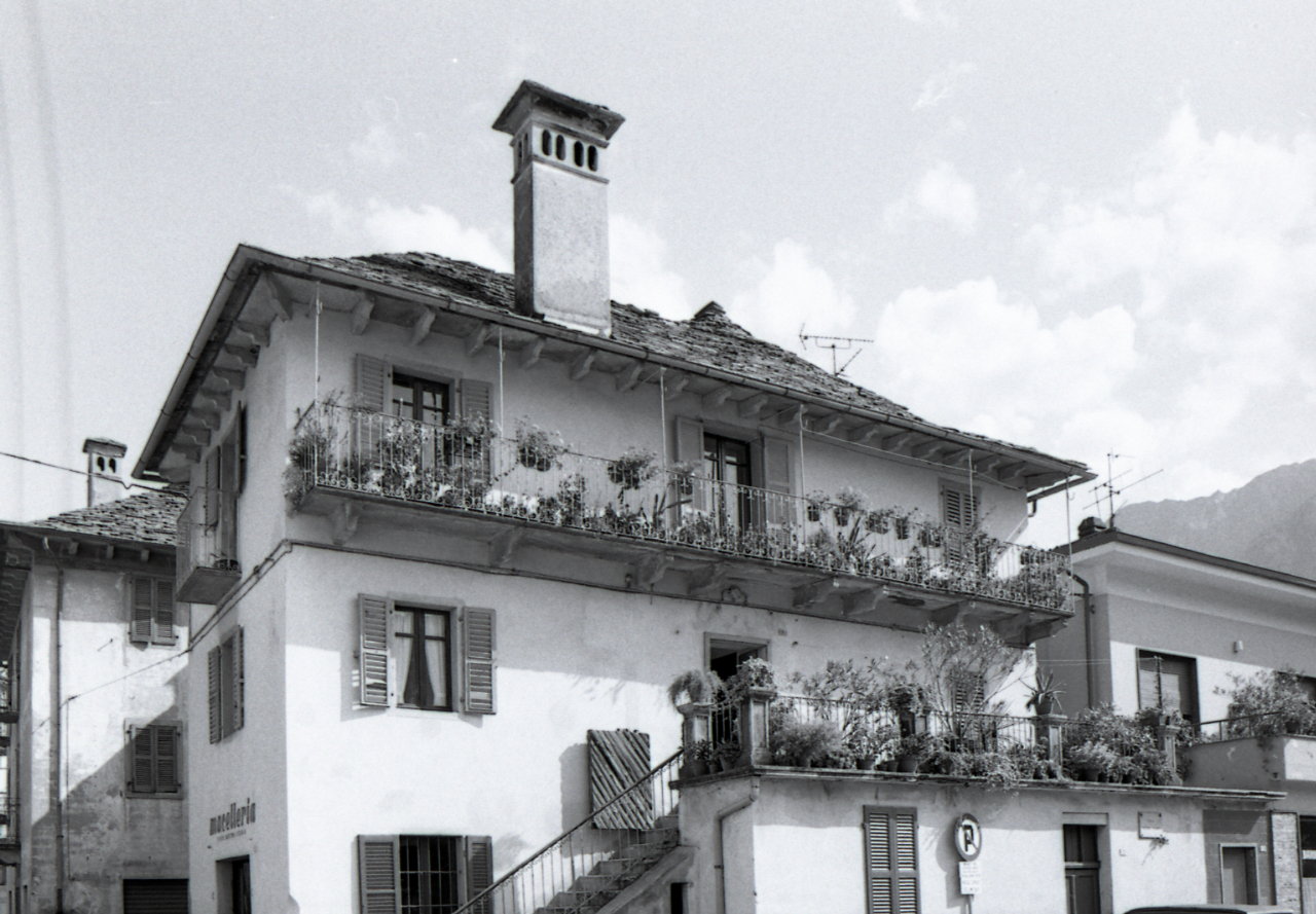 Servizio fotografico : Piedimulera, 1982 / Paolo Monti. - Strisce: 5, Fotogrammi complessivi: 20 : Negativo b/n, gelatina bromuro d'argento/ pellicola ; 35 mm. - ((Sul portanegativi: N[I]K[MA]T FP4 e iscrizione: "Piedimulera 13-32". - Confronta scheda 3849Lpbn13A-32A. - Occasione: Documentazione per la pubblicazione. - Fonte: Agenda di Paolo Monti: Nikon Leika 3001-/ Monti 1978 (1978-1982), presso Archivio Paolo Monti